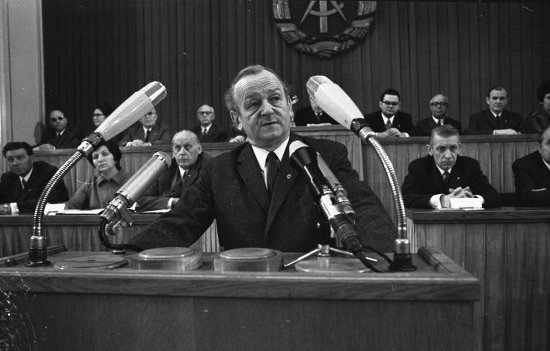 Berlin, 4. Tagung der Volkskammer ADN-ZB/Spremberg/9.3.72/Berlin: 4. Tagung der Volkskammer der DDR am 9.3.72. Zum Tagesordnungspunkt 1 "Begründung des Gesetzes über die Unterbrechung der Schwangerschaft" sprach der Minister für Gesundheitswesen der DDR, Prof. Ludwig Mecklinger. Abgebildete Personen: Mecklinger, Ludwig: Minister für Gesundheitswesen, Mitglied des ZK der SED, DDR (GND 106053248)